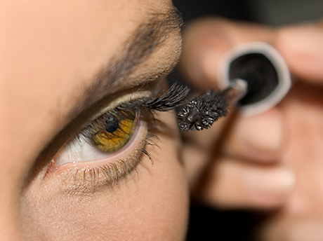 Esta foto la tomé para ilustrar un artículo sobre maquillaje en el número de octubre de la Revista Atlántica. Prácticamente salió así de Camera Raw. Sólo he recortado y retocado después el blanco del ojo, la saturación del iris, una máscara de contraste selectiva y una máscara de enfoque selectiva (pestañas, ojo y pincel del rimel). Profundidad de campo y demás sin retocar.